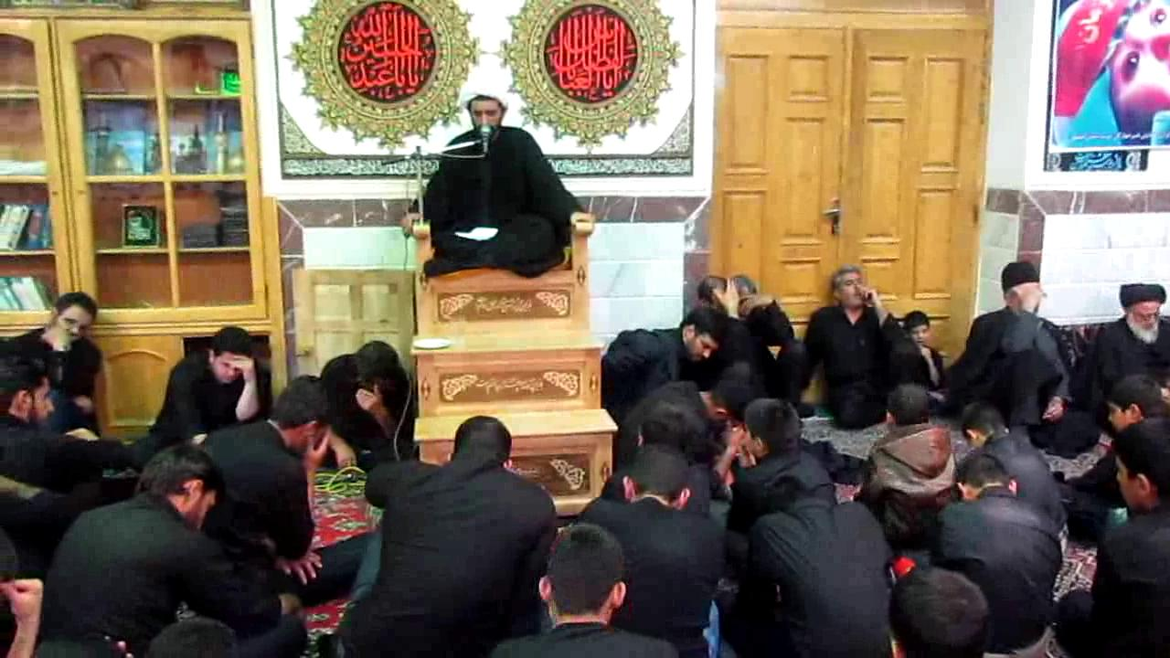 منبر در بیت العباس شهر دامنه